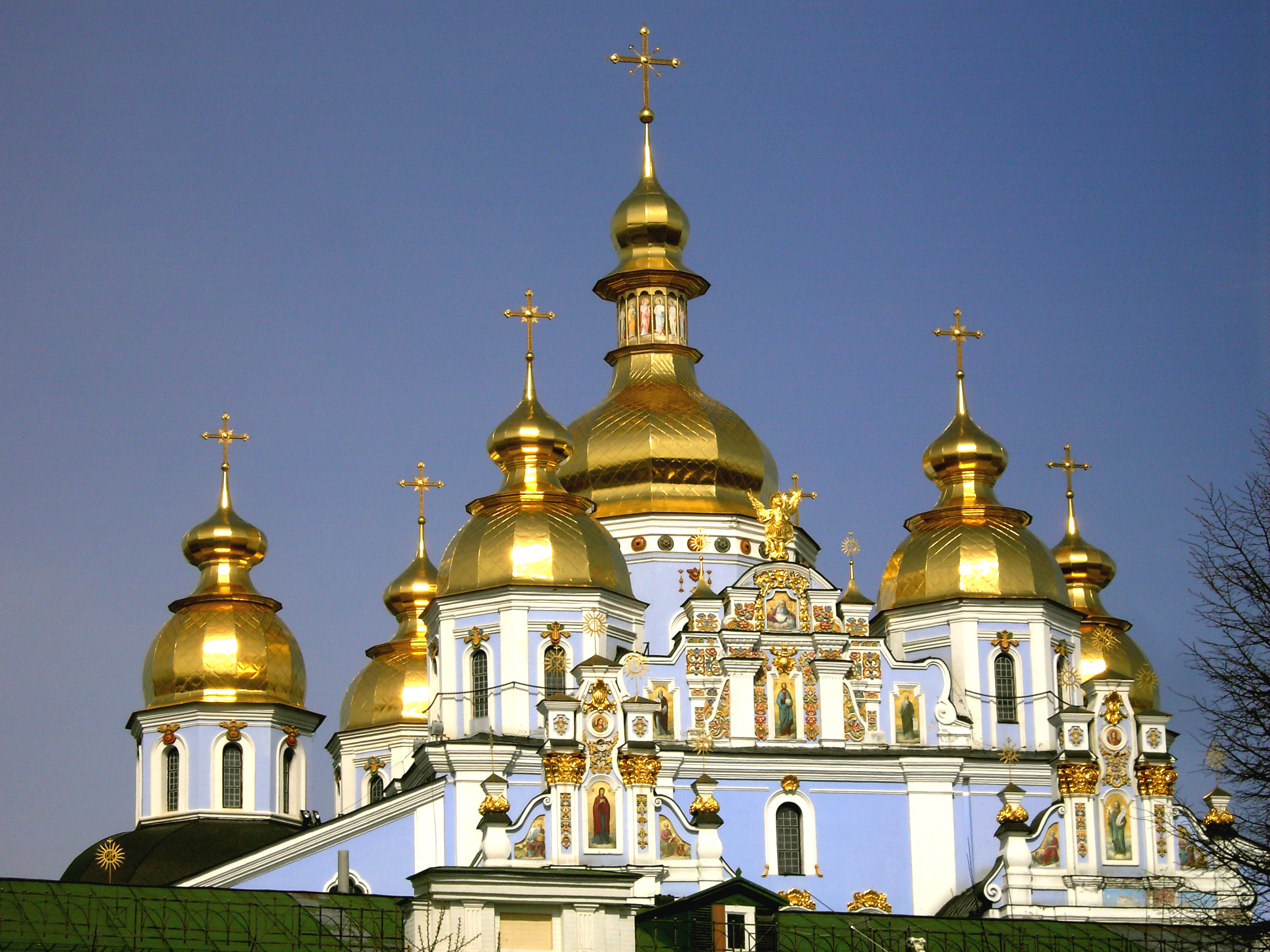 *Sujet:Kiew St. Michael-Kierch Source:Fotograf Lutz Fischer-Lamprecht ex-Commons (Blatz erausgeholl vum )